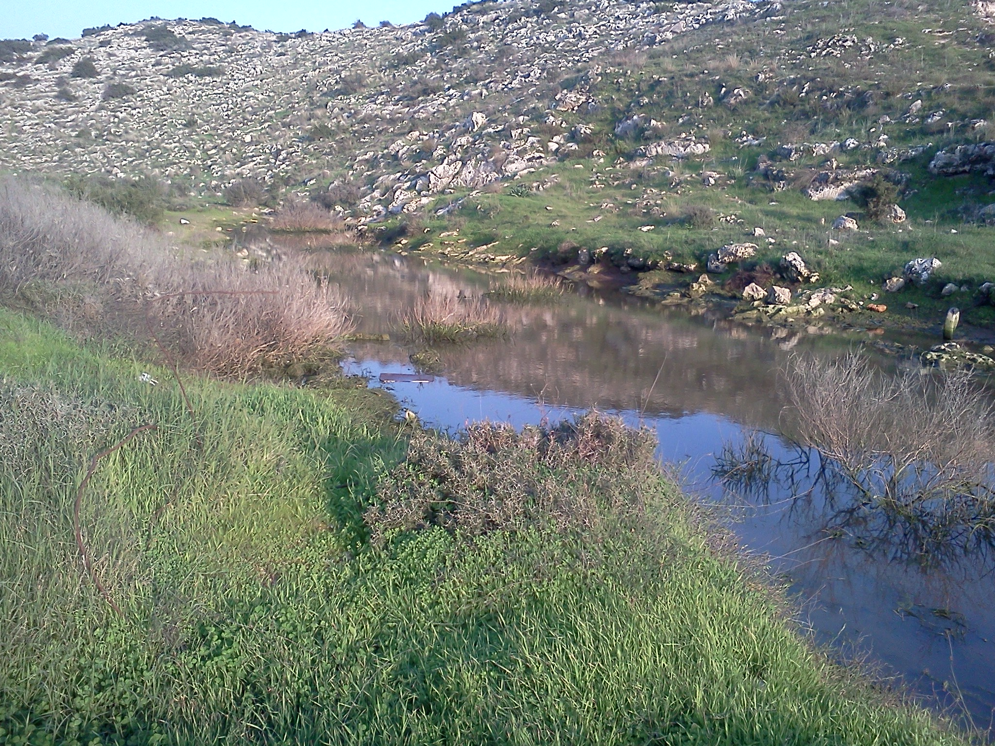 בריכת חורף בנחל רבה